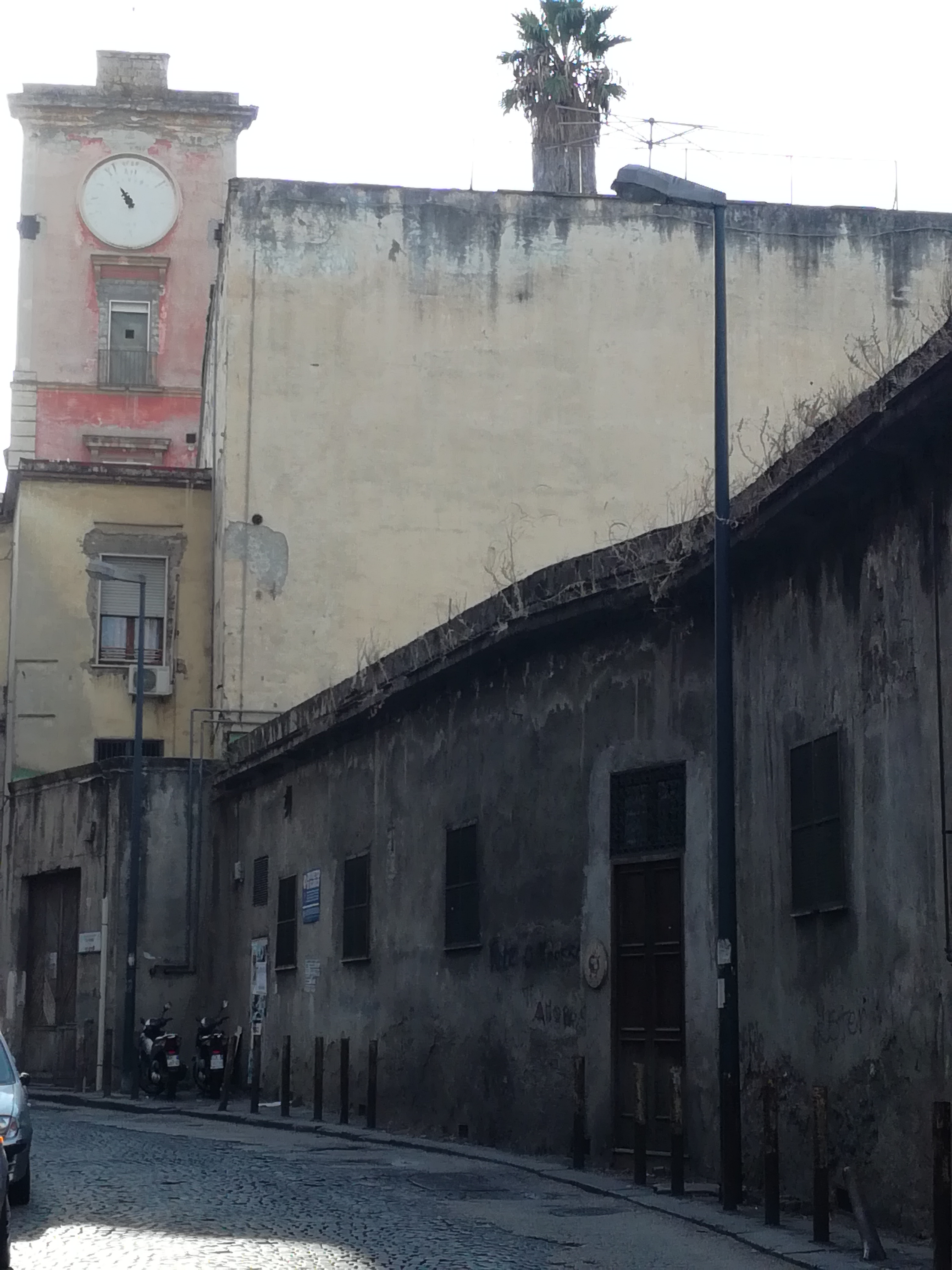 Orologio della Chiesa di Santa Maria della Vita (Napoli)